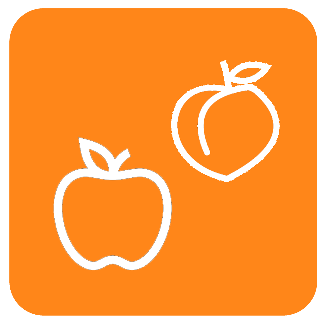 Símbolo utilizado para identificar a la estación Requinoa en 2001.